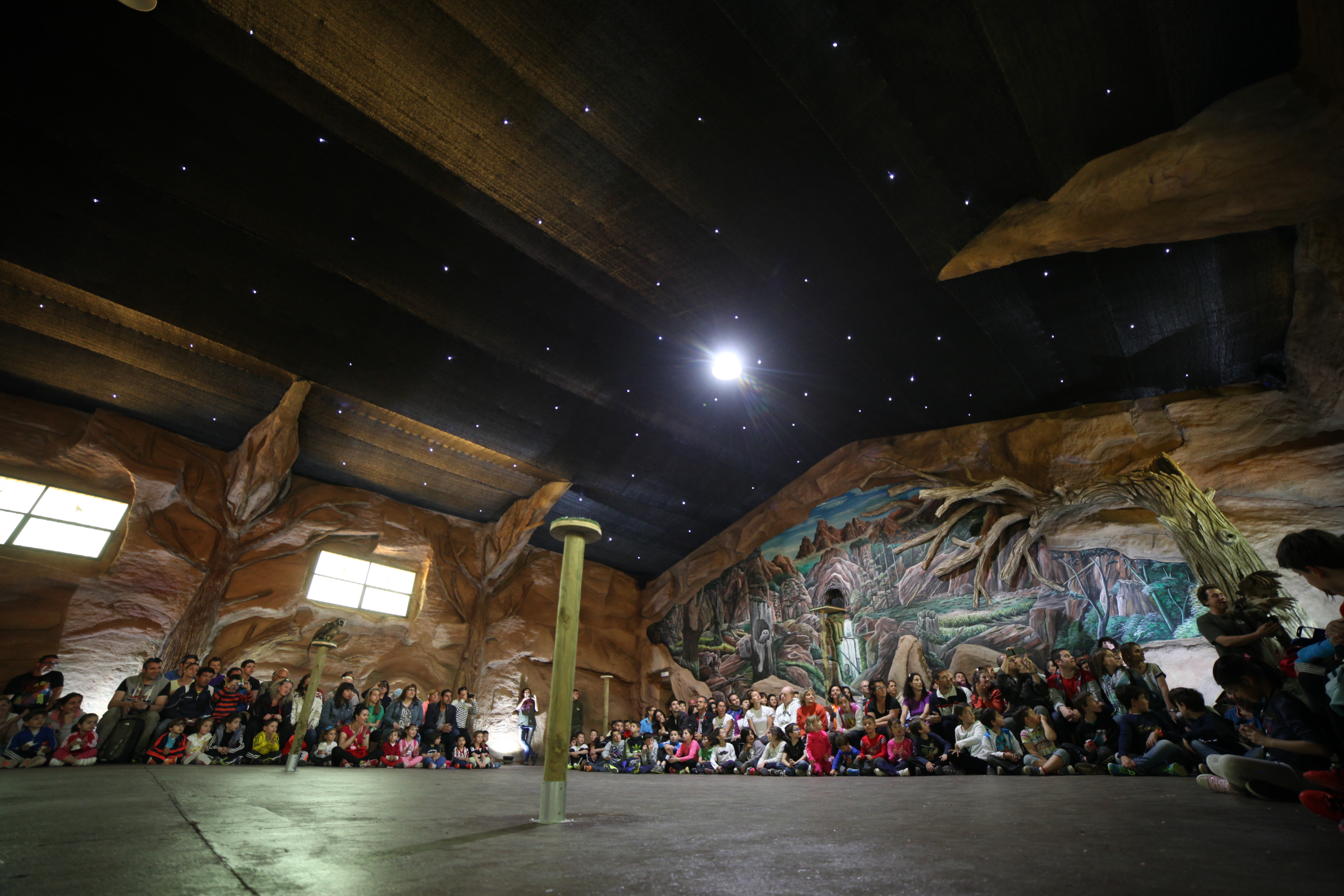 Demostración aves rapaces nocturnas en Tierra Rapaz